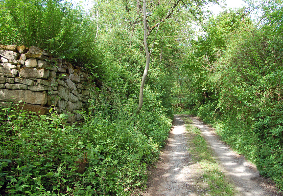 Hohlweg im Gewann Brennerin vor der Rotenacker Spitze auf Markgröninger Markung. Relikt einer einst gepflasterten Römerstraße, die am Ostrand des Rotenackers entlang verlief und 1331 noch sichtbar war.